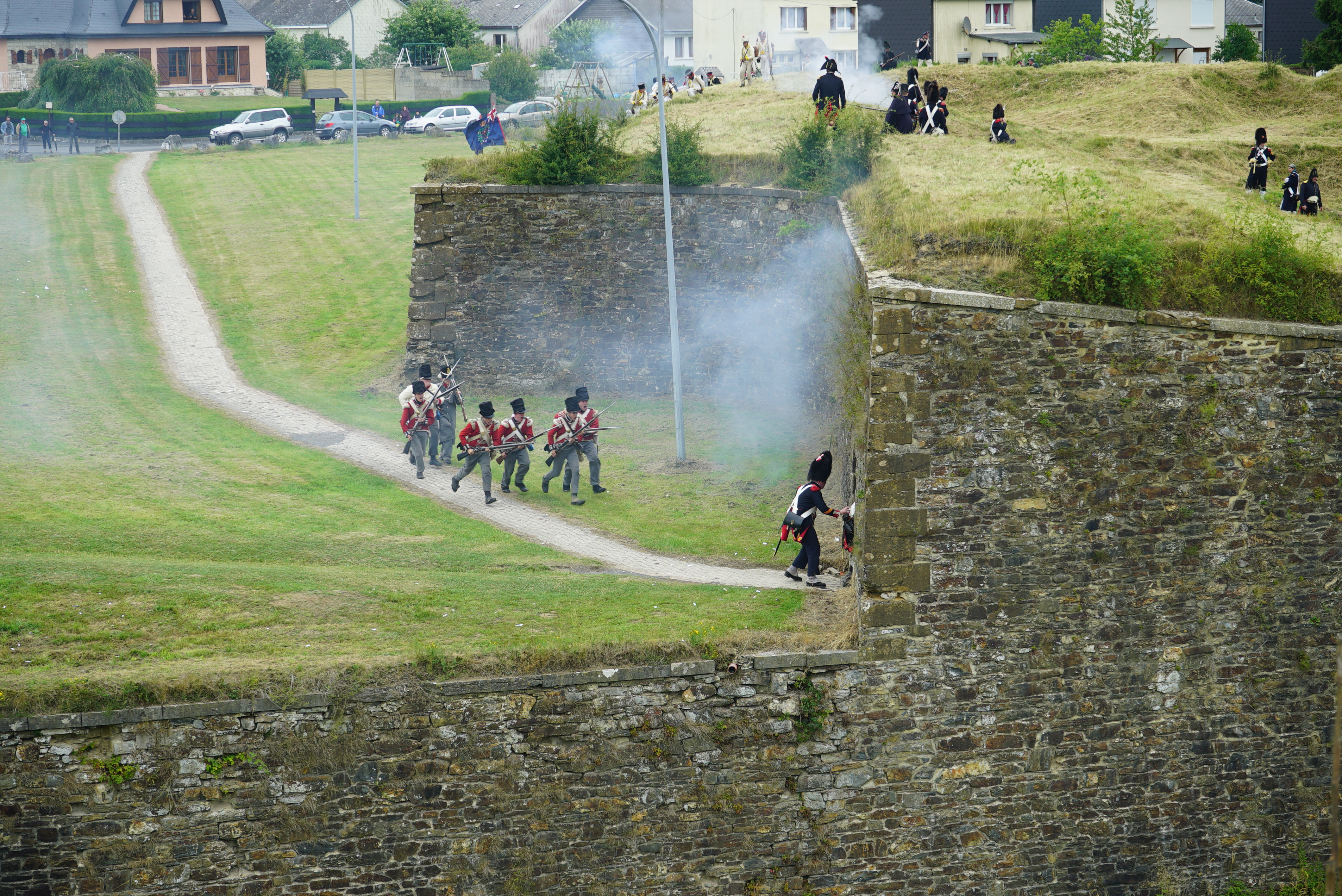 lors du Bi-centenaire de siège de Rocroi.